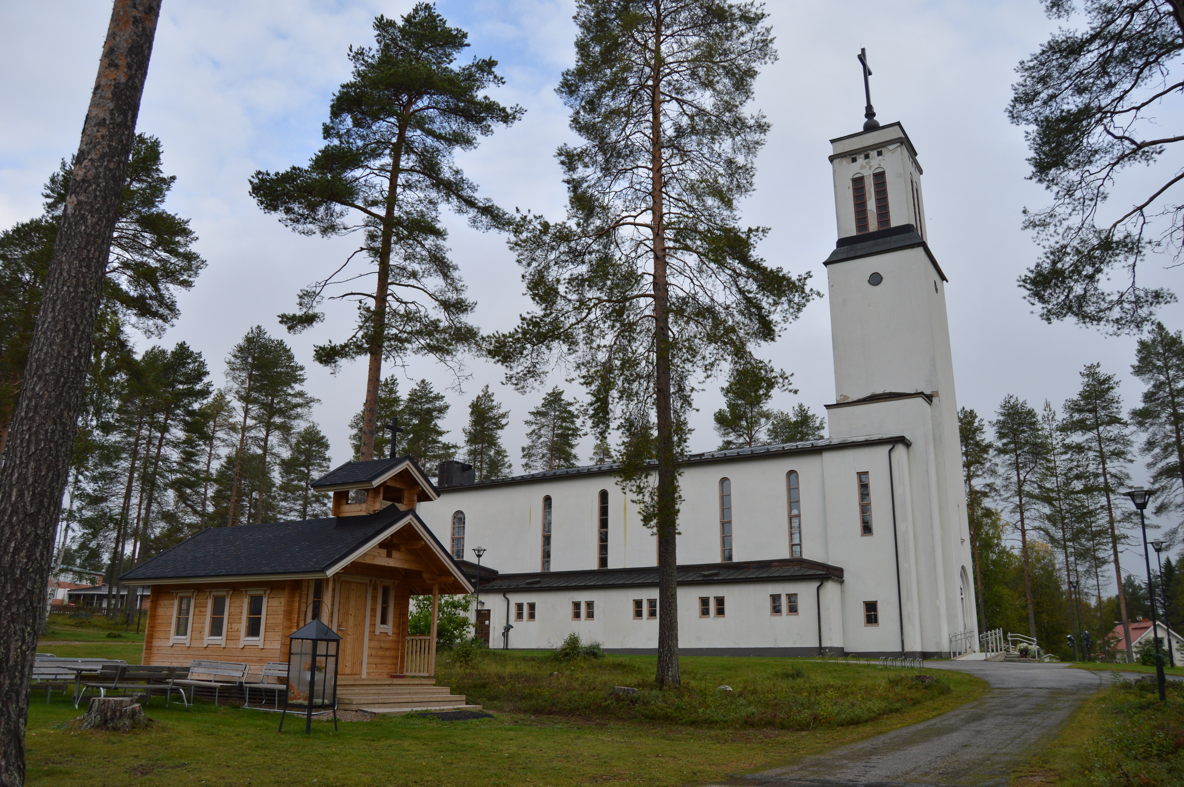 Paltamon kirkko ja pieni puinen lasten leikkimökkikirkko.